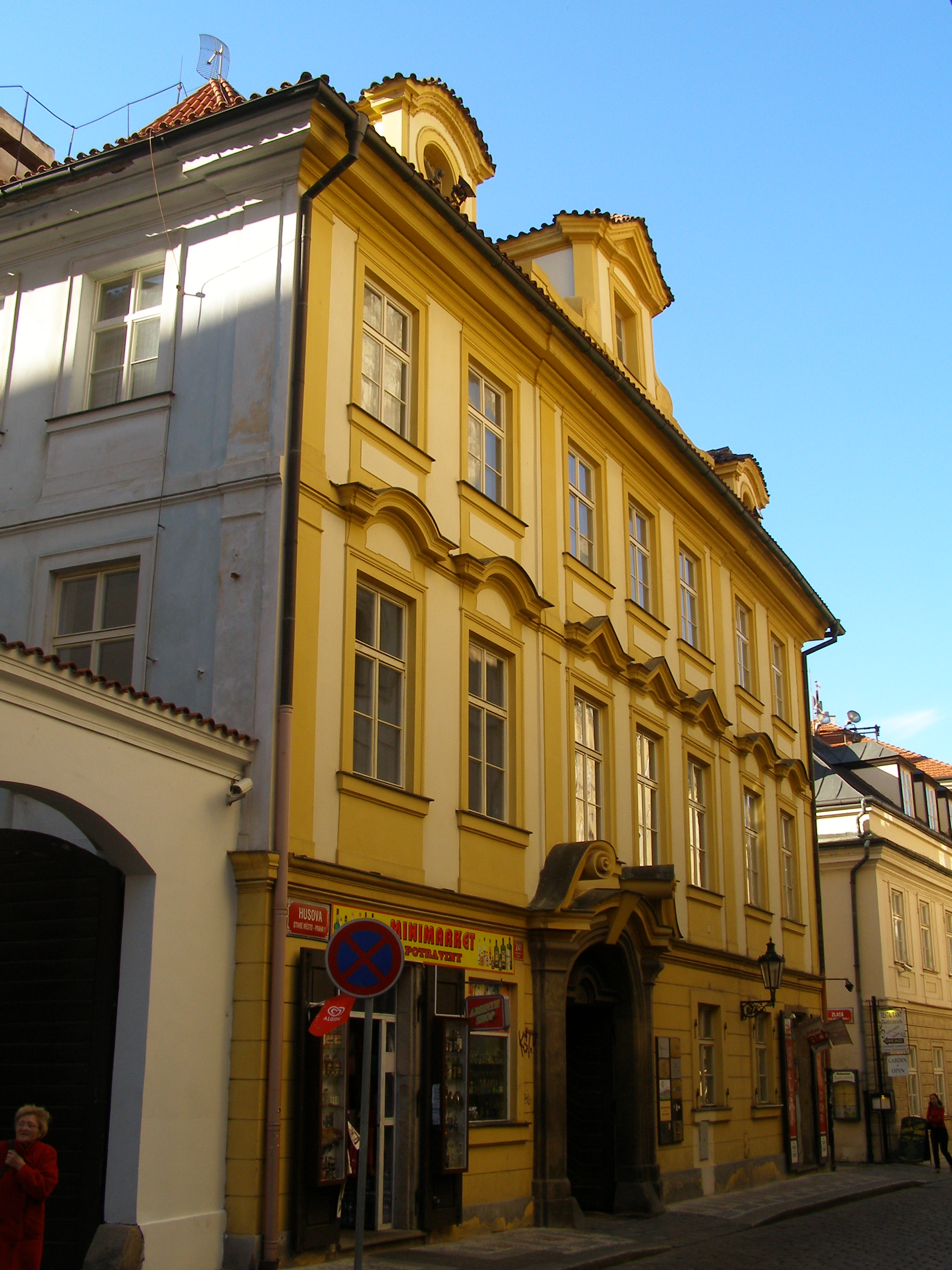 Palác Hochbergů (Staré Město), Praha 1, Husova, Zlatá 241/7, Staré Město